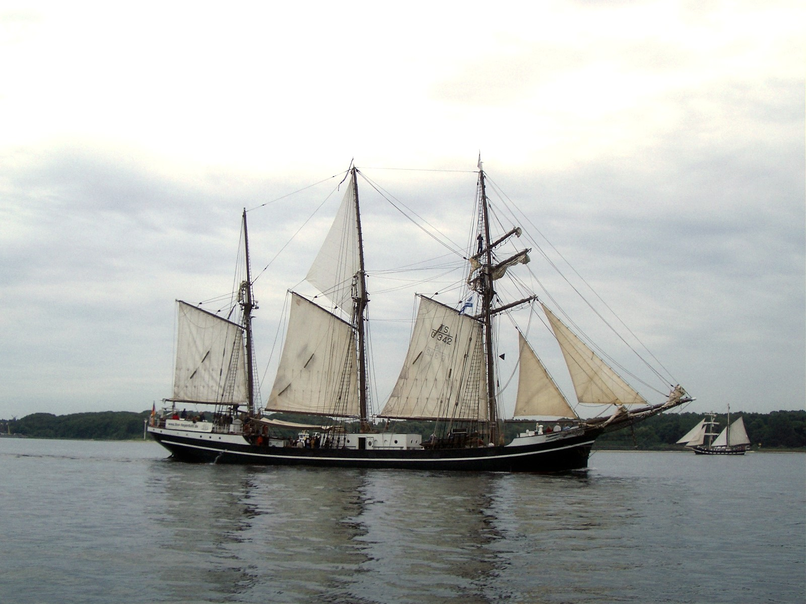 Segelschiff (Dreimast-Toppsegelschoner) Thor Heyerdahl auf der Kieler Woche 2007.